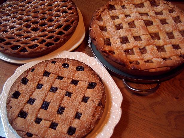 Limburgs: Zjwarte proeme linzetoert, appellinzetoert en keersjevla mèt lödderkes.